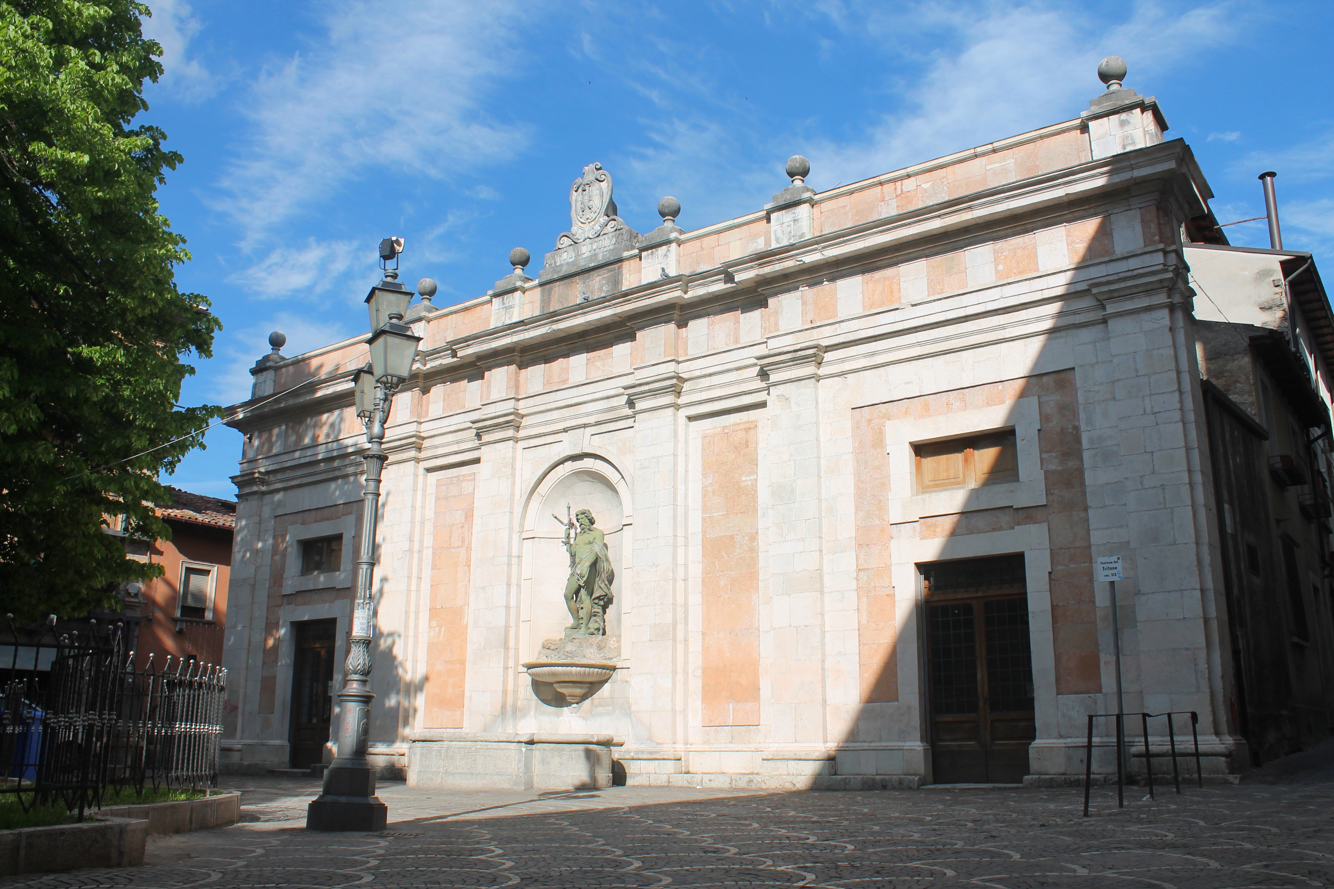 Fontana del Nettuno in piazza Regina Margherita, L'Aquila